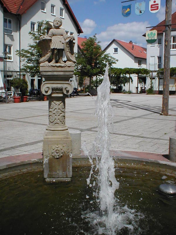 Rathausbrunnen in Waibstadt, eines der Wahrzeichen der Stadt